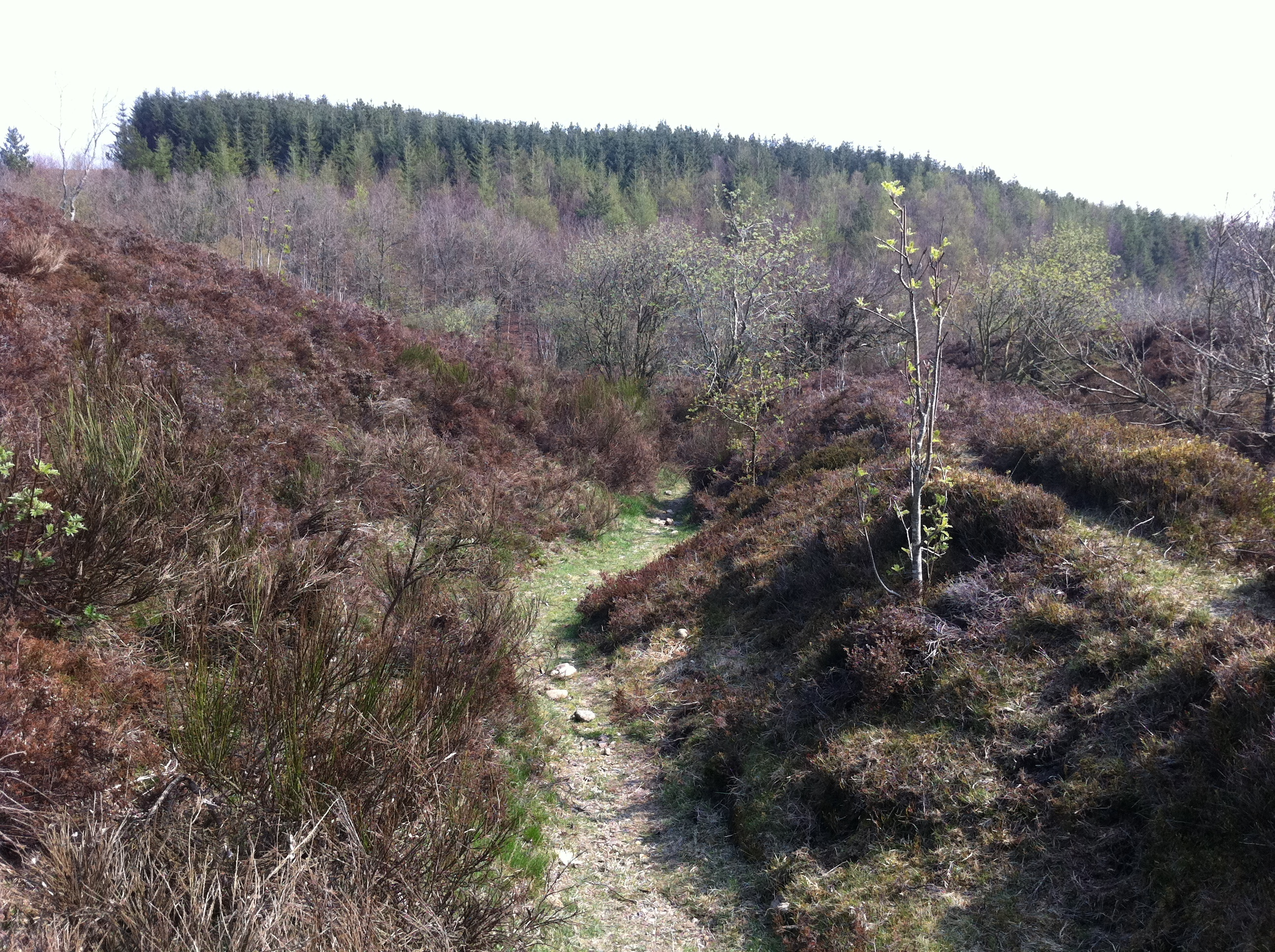 Klosterheden